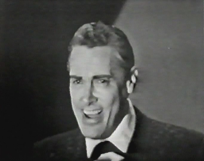 Eurovision Song Contest 1965 Regia di ROMOLO SIENA Allestimento scenografico di FRANCESCO DE MARTINO Luci di GUIDO CARACCIOLO Assistente alla regia ELENA AMICUCCI Assistente di studio MARCELLO SABETTI Capo stuadra tecnica ANGELO FONTANA Prima controllo camere GUSTAVO GALLARATO Capo tecnico audio CIRO PALLONETTO Cameramen ADOLFO BOTTA, SERGIO FREISSENET, ENRICO LANDINI, FLORIDO VARZI ________________________________ Mario del Monaco